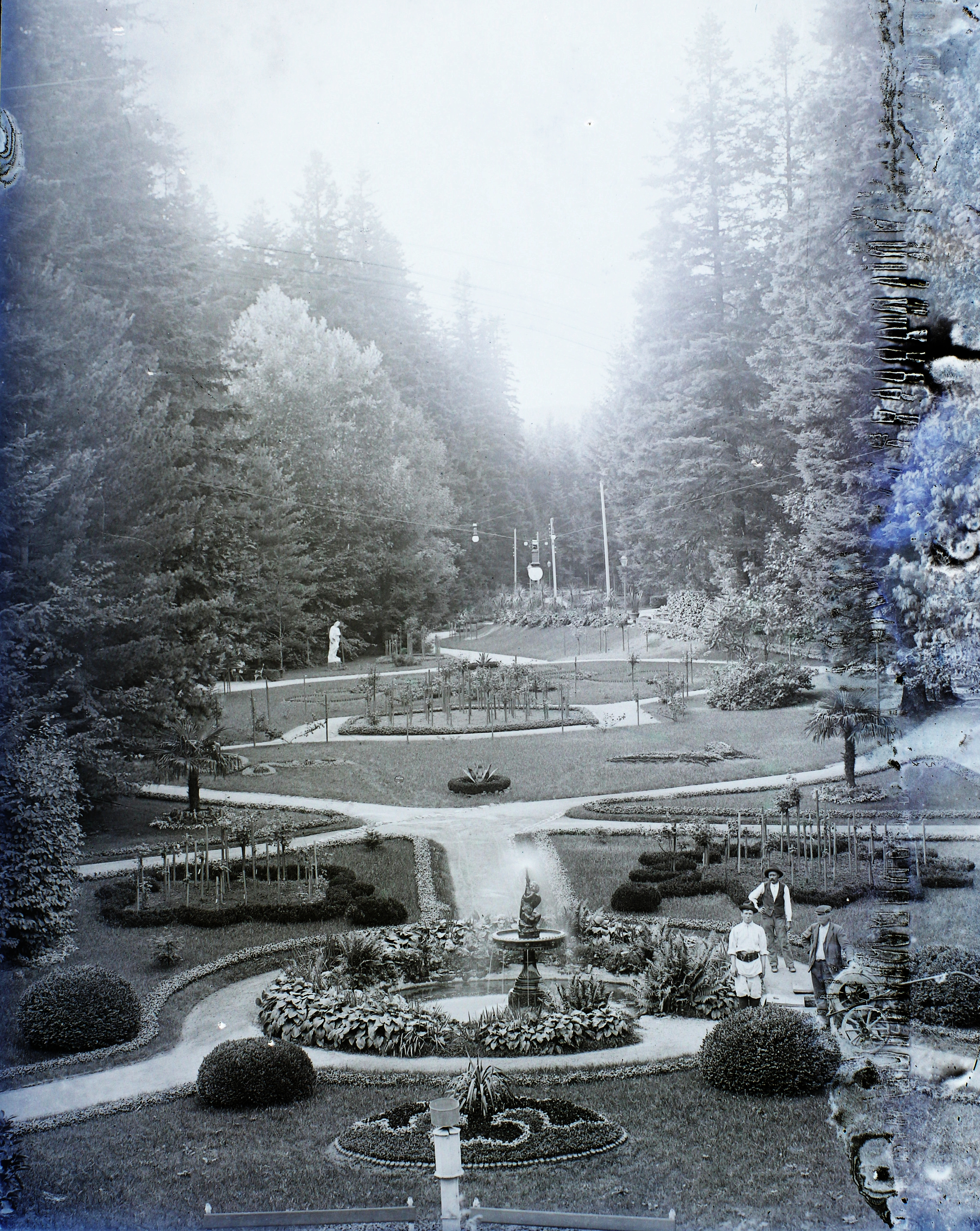 Marillavölgy, a szanatórium parkja. Location: Romania, Transylvania, Oravita Tags: healthcare Title: Marillavölgy, a szanatórium parkja.